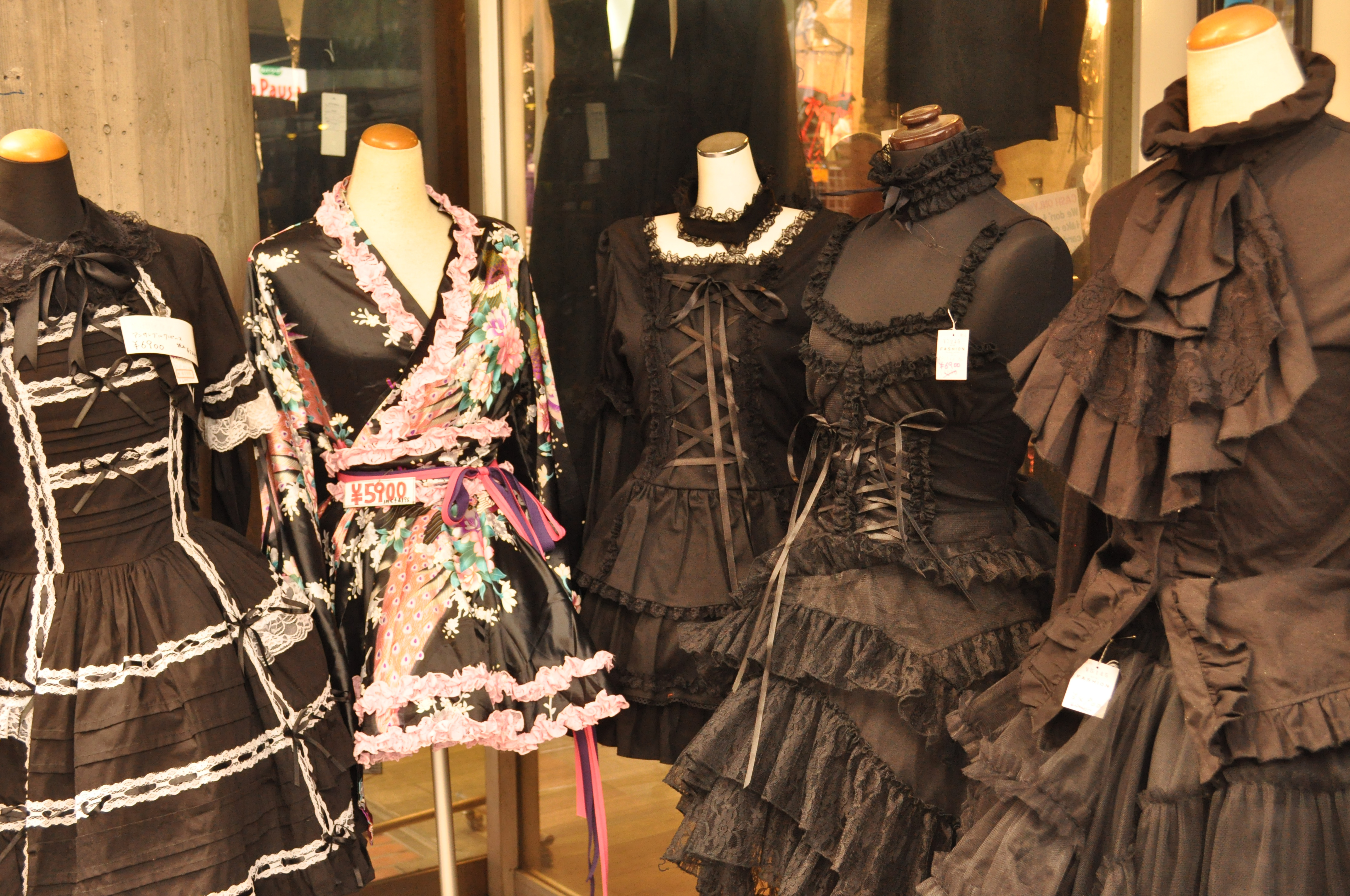 ゴシックロリータの衣類